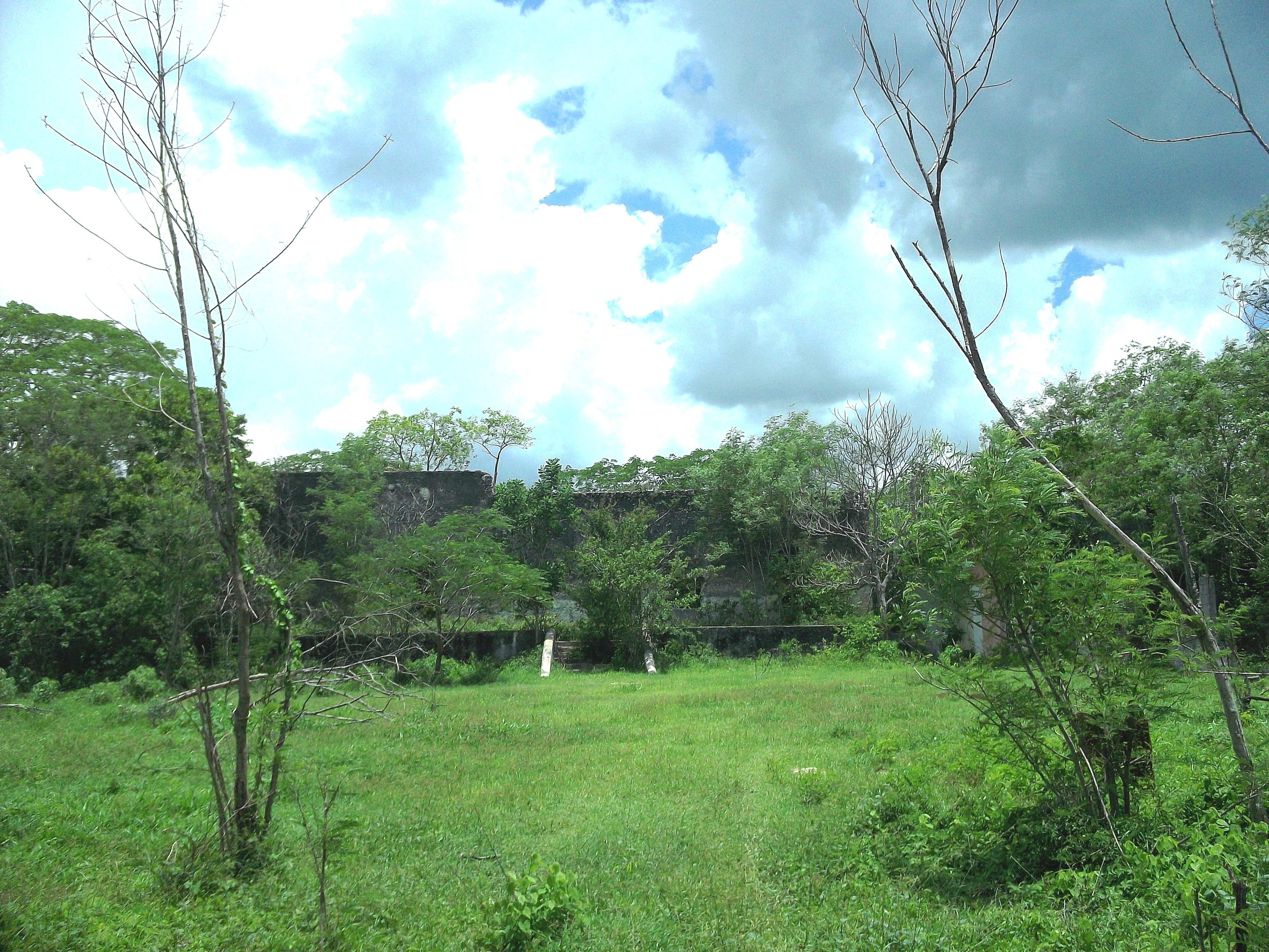 Casa principal a Chantún.